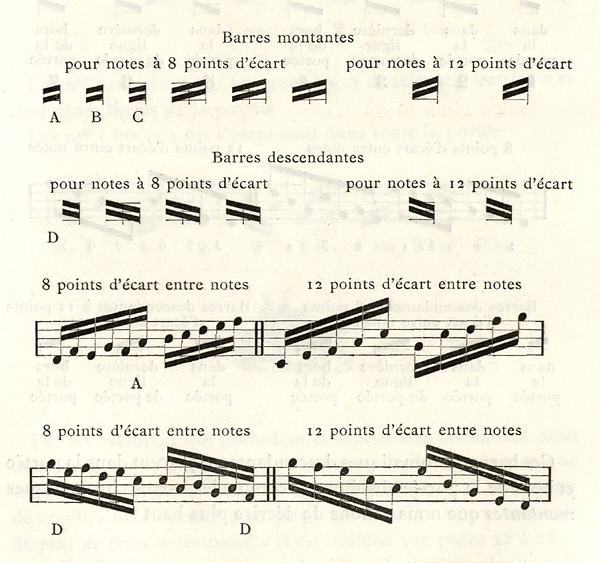 Extrait du Manuel de typographie musicale"" de 1891 par Théophile Beaudoire.